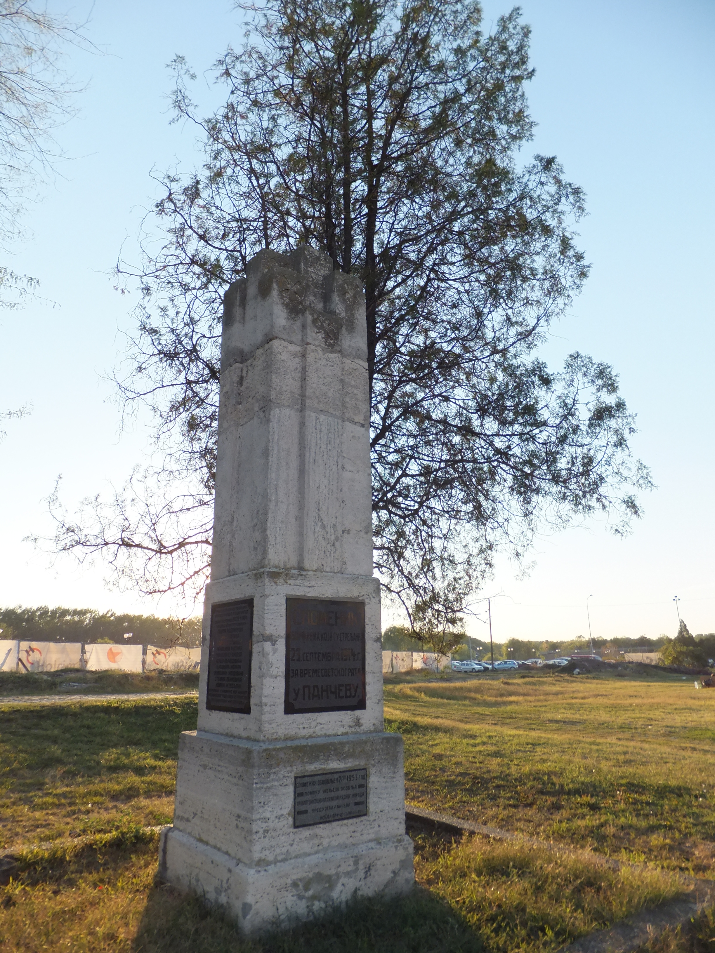 Споменик стрељаним родољубима из Борче